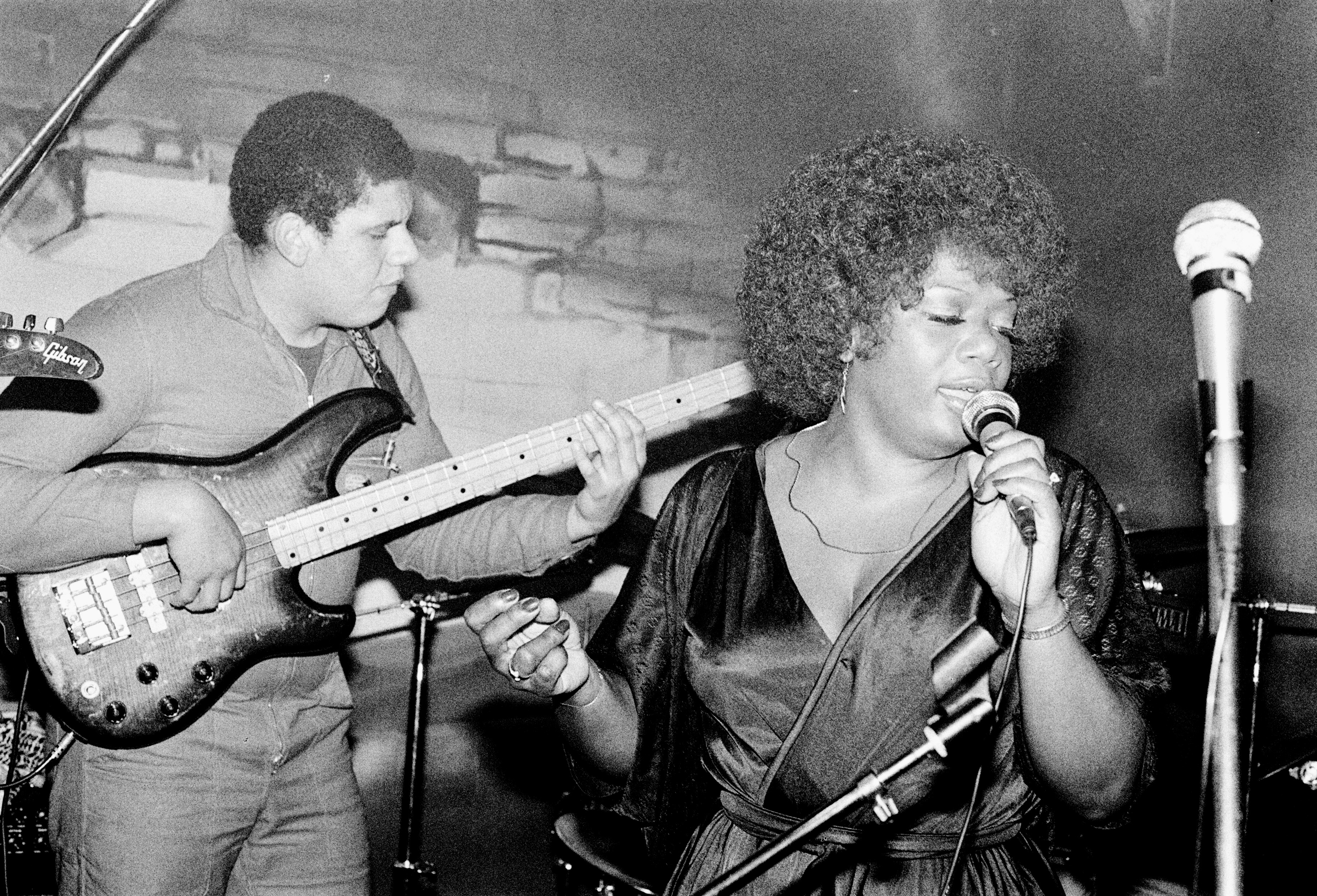 La chanteuse américaine de blues Zora Young en concert à Plougonven avec a la basse Daniel Largent (Bretagne, France) en 1982.